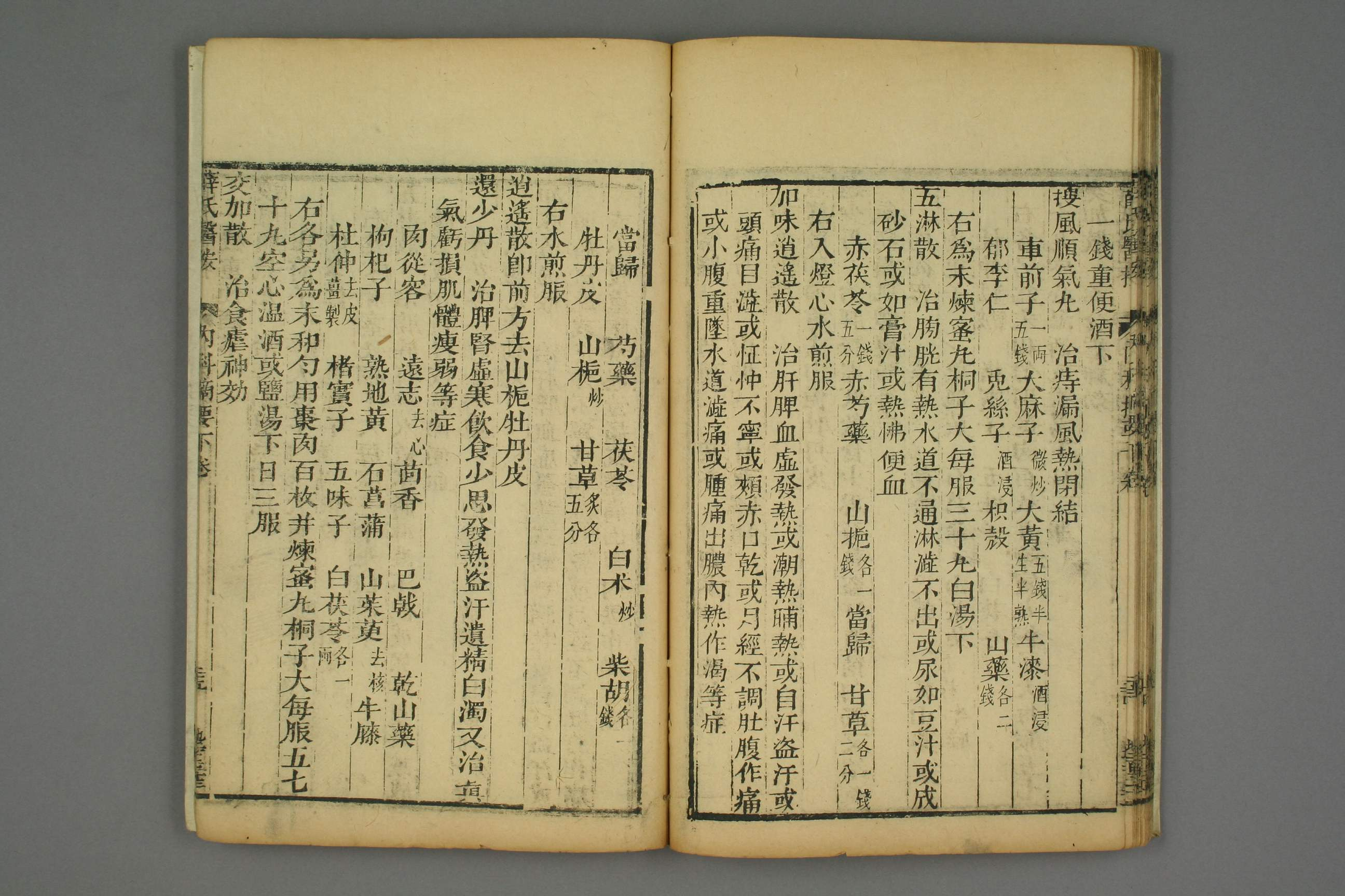 Naikatekiyo-kamishoyosan